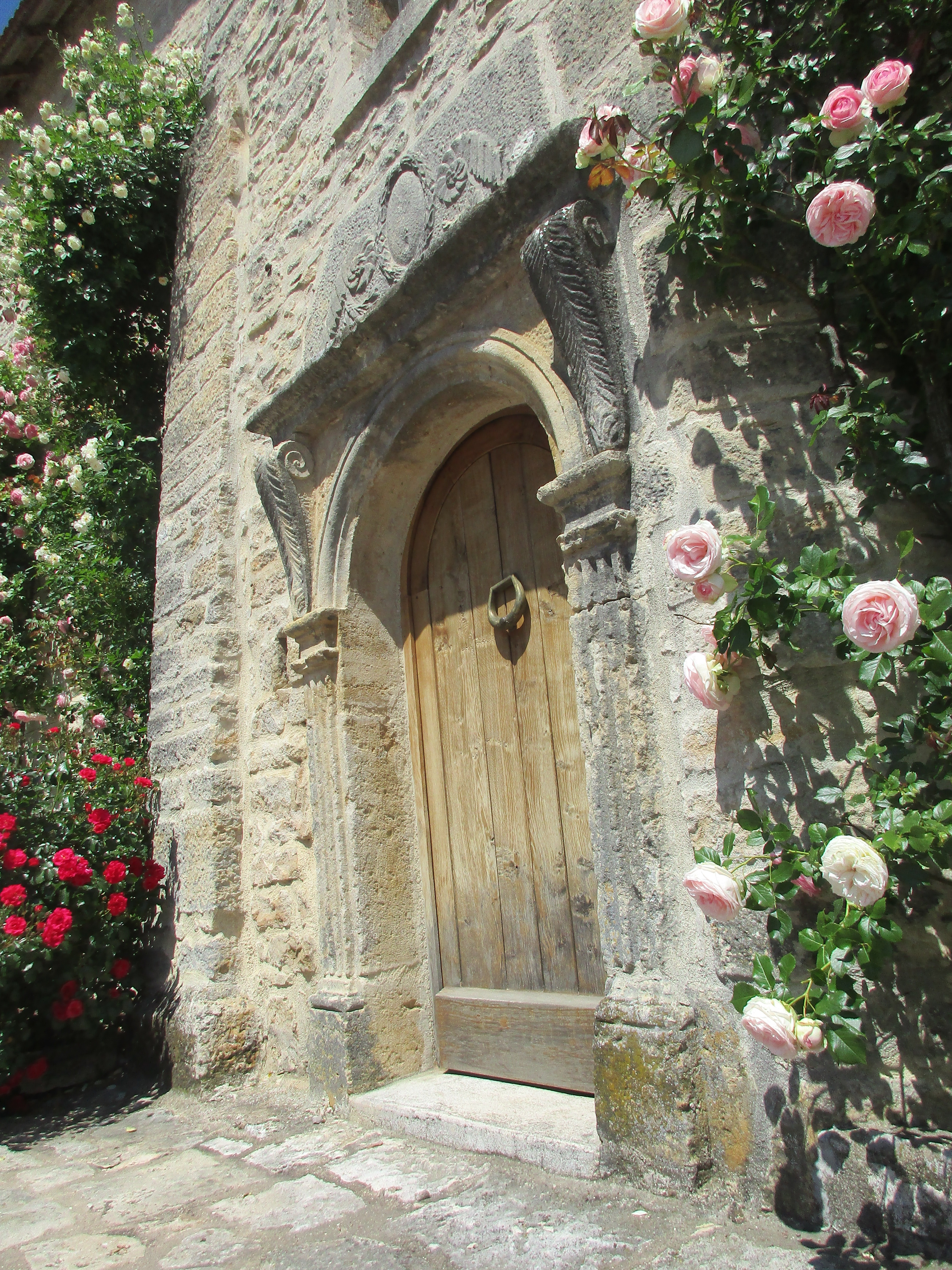 Le manoir de Bouhans et Feurg est la construction la plus ancienne du village . Sa reconstruction apres la destruction du village a la fin du XVI , fut agrandie par l'adjonction d'une tour avec escalier a vis au XVII .XVIII eme